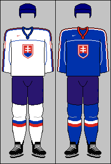 Slovak national team jerseys from World Championships 2001-2004 and Winter Olympic Games 2002